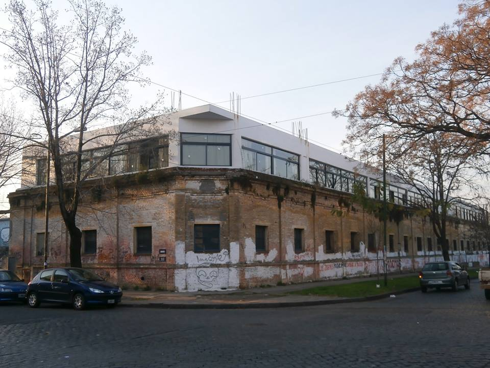 Facultad de Trabajo Social de la Universidad Nacional de La Plata, edificio ampliado sobre la calle 63. Fotografía: Eric Hamilton.